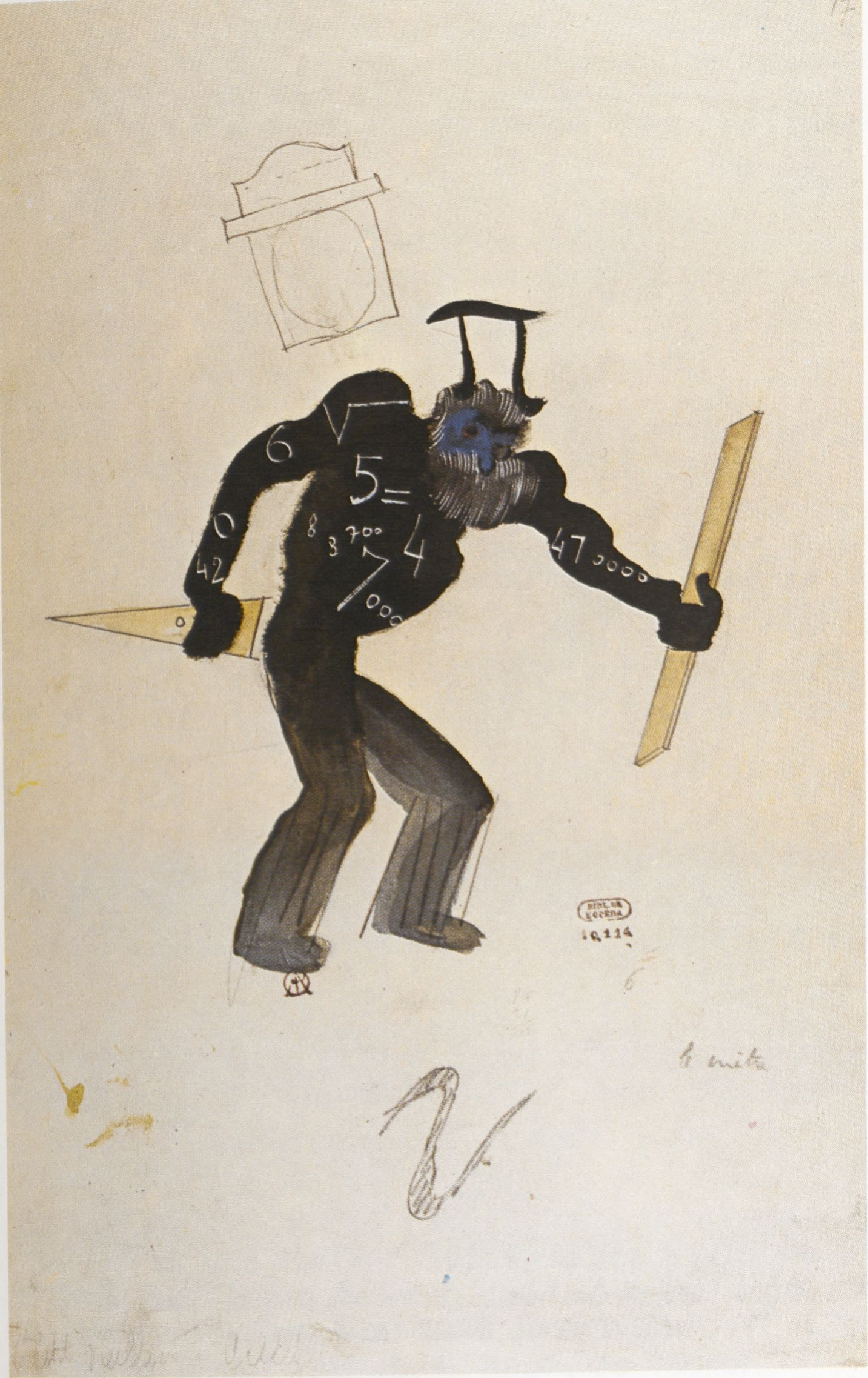 Костюм учителя арифметики (Маленького старичка) к опере «Дитя и Волшебство» Равеля, эскиз Поля Колена к постановке 1939 года.